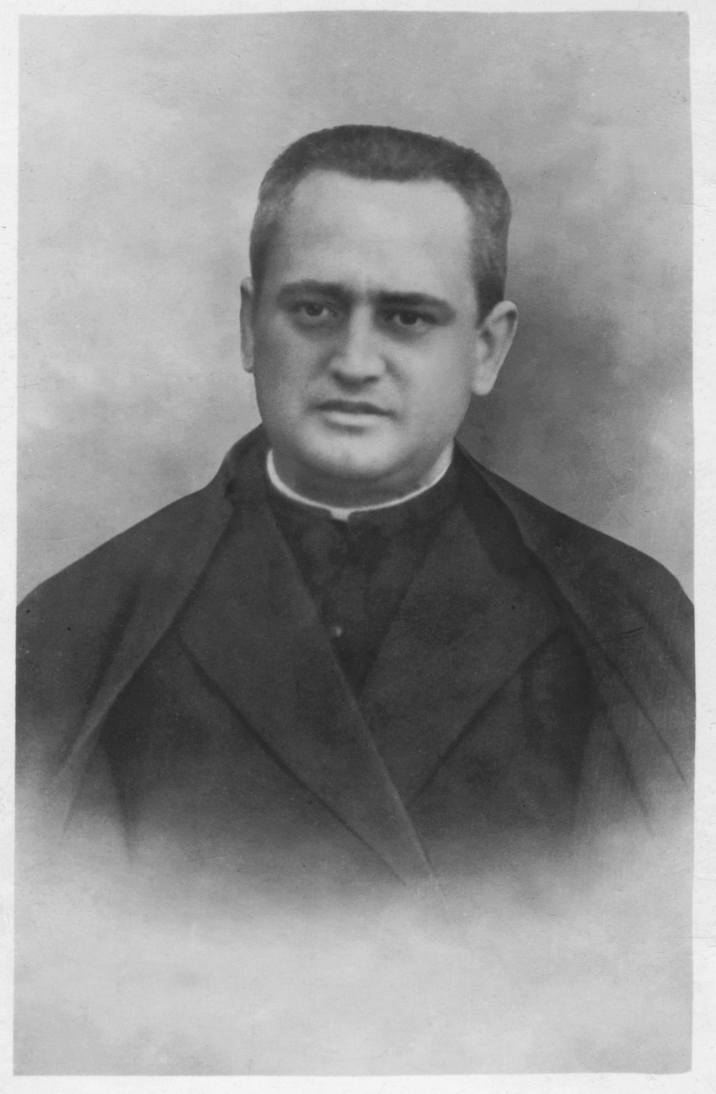 Fotografía particular tomada hace más de 70 años